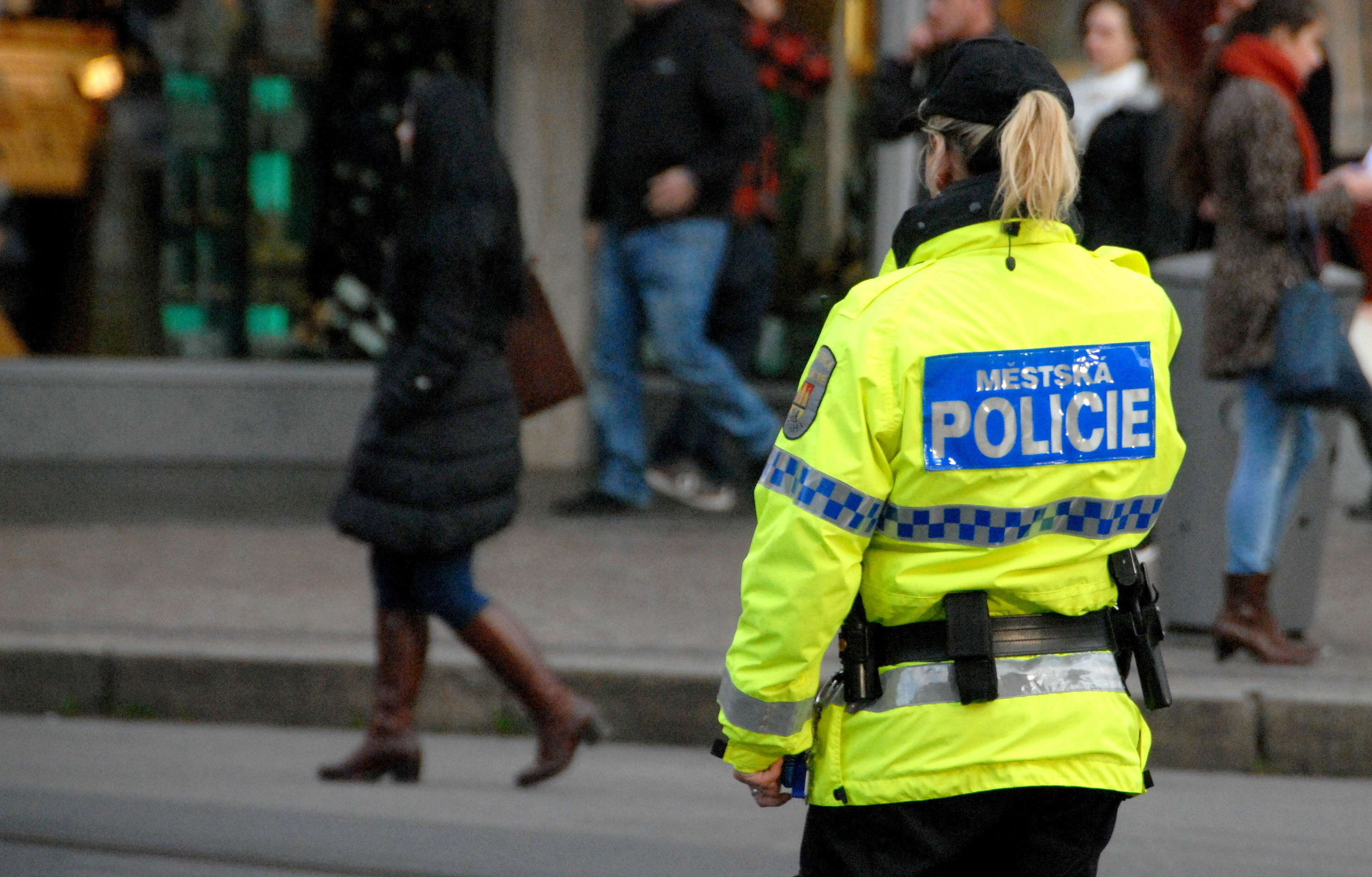 Městská policie (Gemeindepolizei) in der tschechischen Landeshauptstadt Praha auf dem Wenzelsplatz